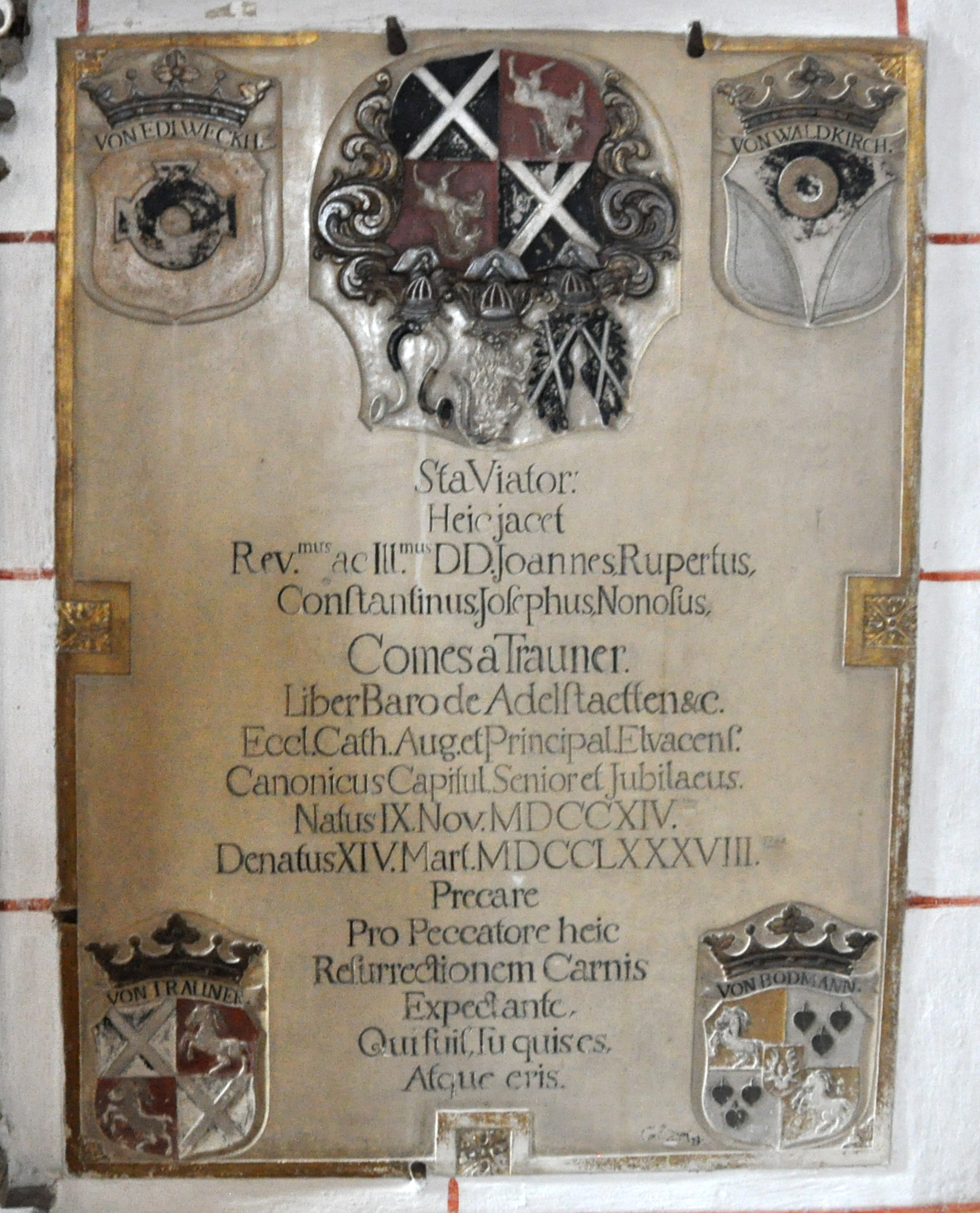 Augsburg, Dom, äußerstes nördliches Seitenschiff; Epitaph für Johann Rupert von Trauner († 14. März 1788). Signiert Gözel (Joseph Götzel). Mit gestürztem Wappen Trauner und Ahnenwappen Edlweckh, Trauner, Waldkirch, Bodman.